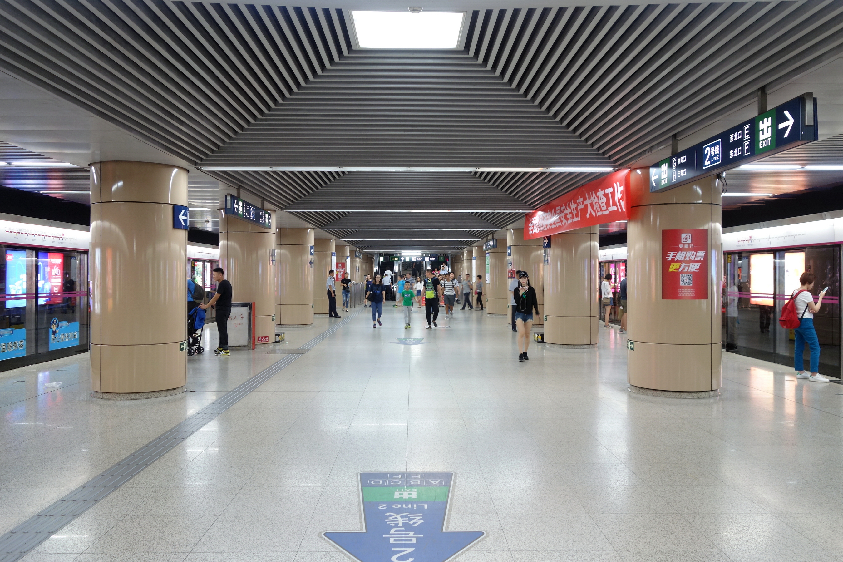 北京地铁5号线崇文门站岛式站台